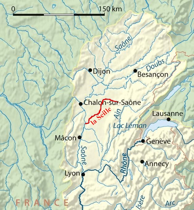 surlignage du tracé de la rivière Seille (affluent de la Saône) France